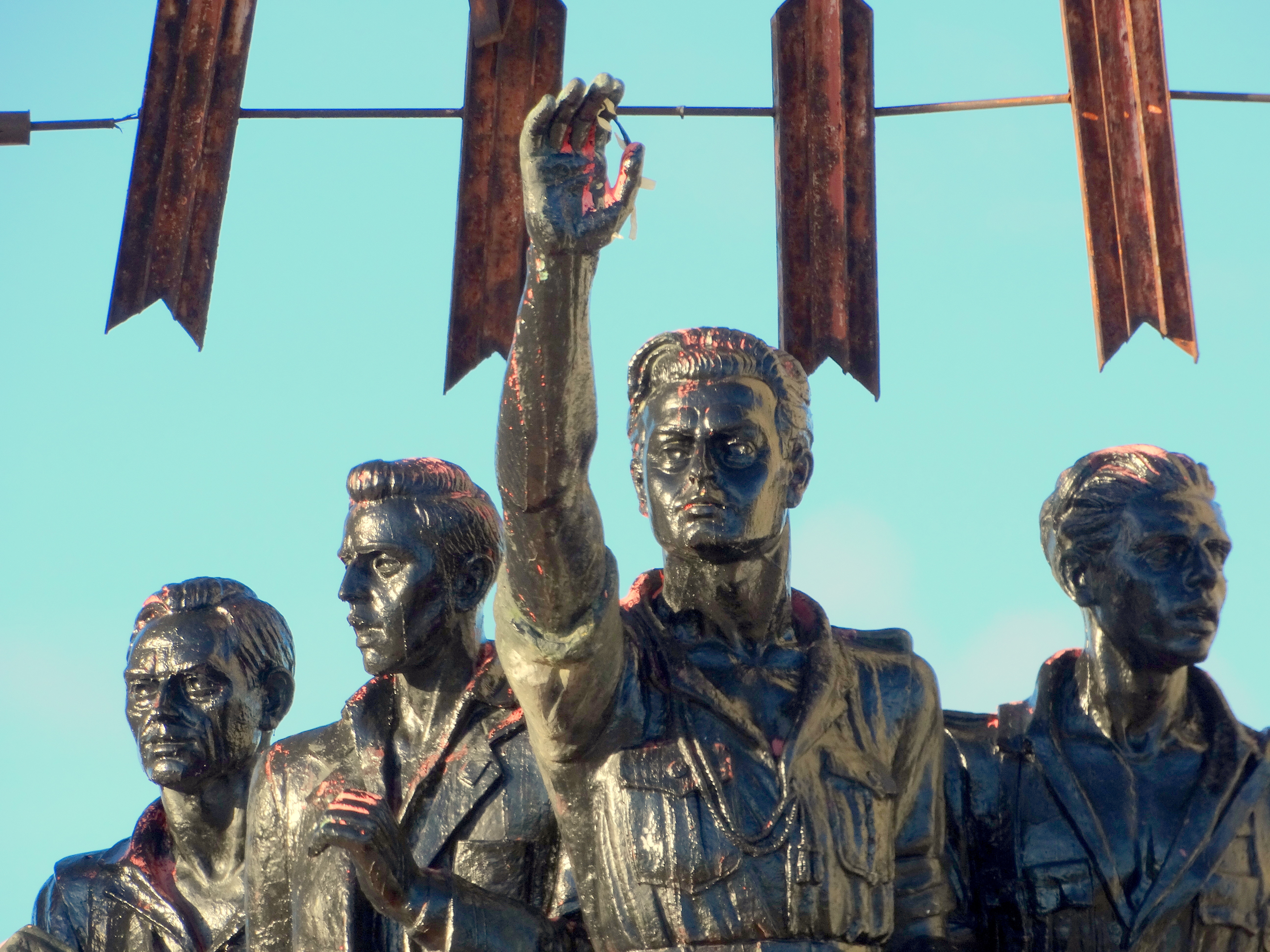 Monumento a Onésimo Redondo inaugurado el 25 de julio de 1961 en el Cerro de San Cristóbal de Valladolid. En el 2014 el monumento está muy deteriorado y abandonada su conservación.